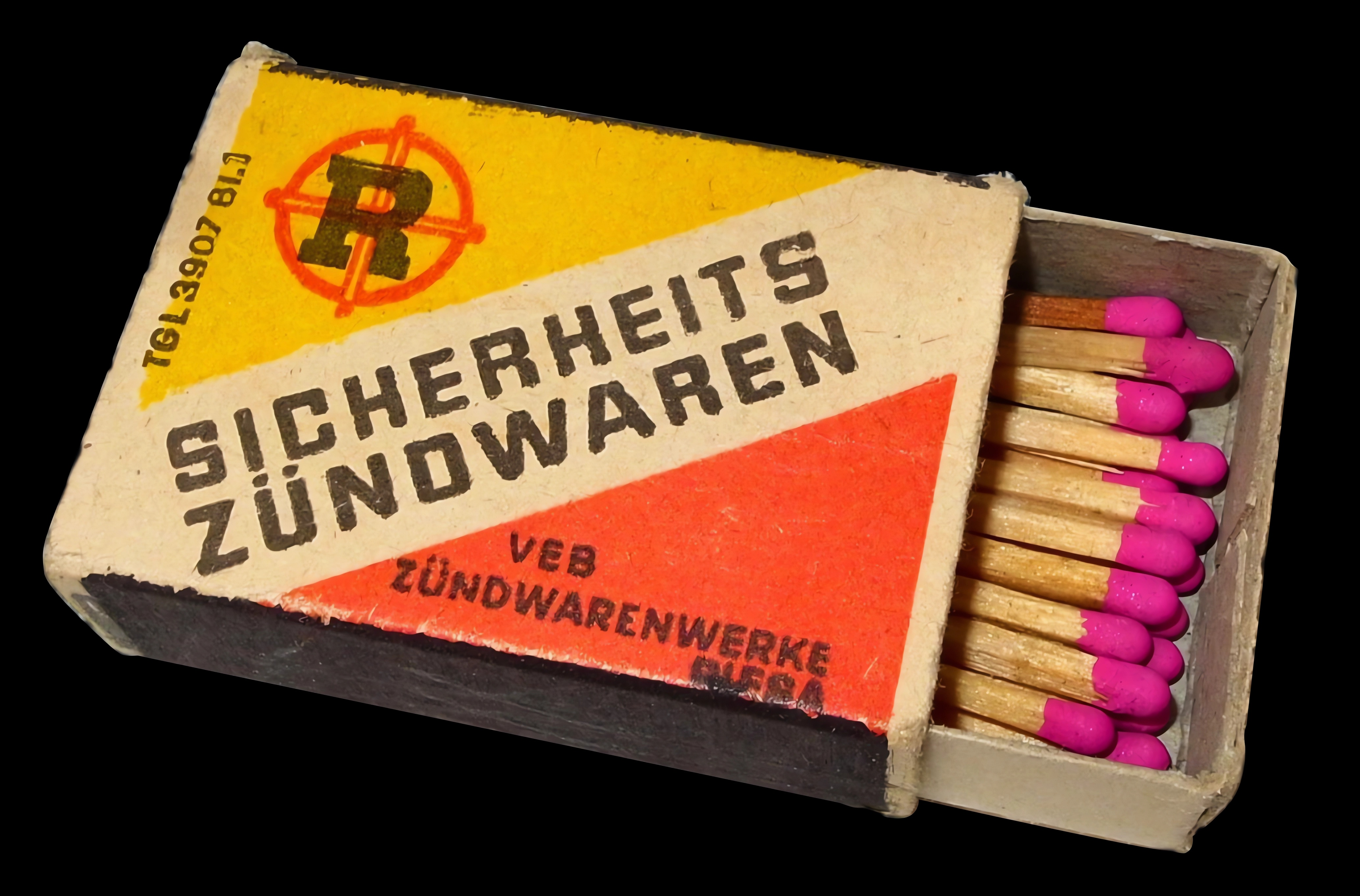 Sicherheits Zündwaren, VEB Zündwarenwerke Riesa